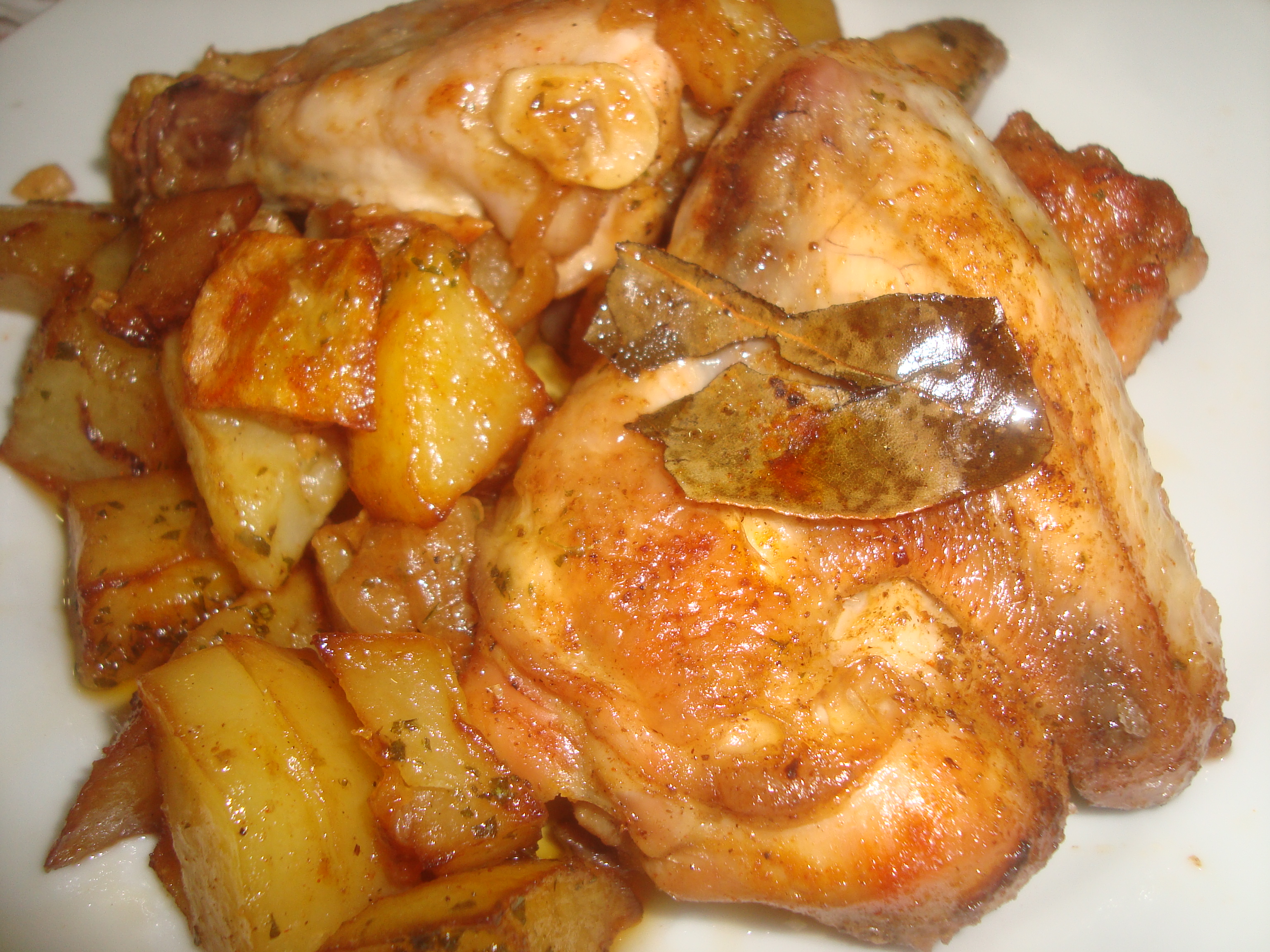 Alas de pollo con patatas pobres (Castellón, España). This photo has been taken in the country: Spain